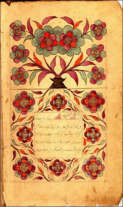 Tempoh hakcipta telah tamat. This image is in the public domain because under United States copyright law, originality of expression is necessary for copyright protection, and a mere photograph of an out-of-copyright two-dimensional work may not be protected under American copyright law. The official position of the Wikimedia Foundation is that all reproductions of public domain works should be considered to be in the public domain regardless of their country of origin (even in countries where mere labor is enough to make a reproduction eligible for protection). This image is in the public domain in the United States. In most cases, this means that it was first published prior to January 1, 1923 (see the template documentation for more cases). Other jurisdictions may have other rules, and this image might not be in the public domain outside the United States. See Wikipedia:Public domain and Wikipedia:Copyrights for more details.